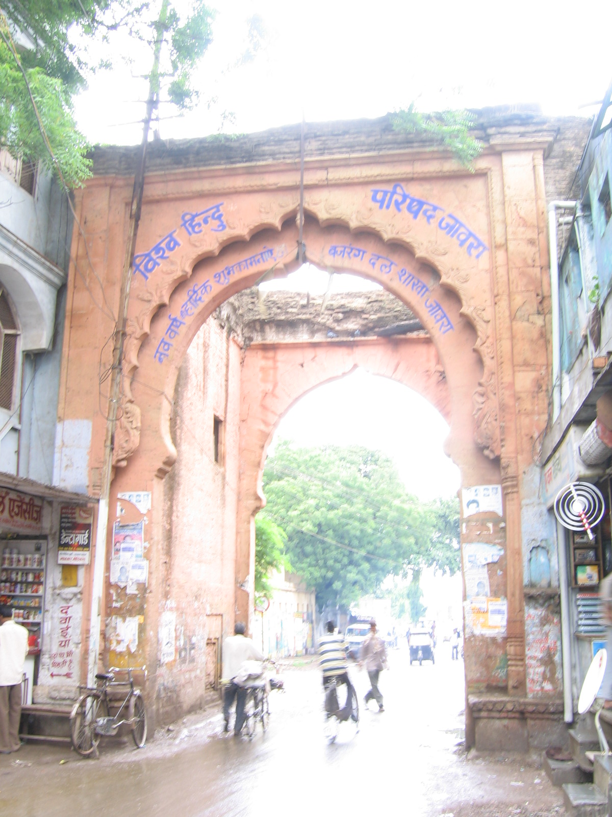 Ratlami Gate, Jaora